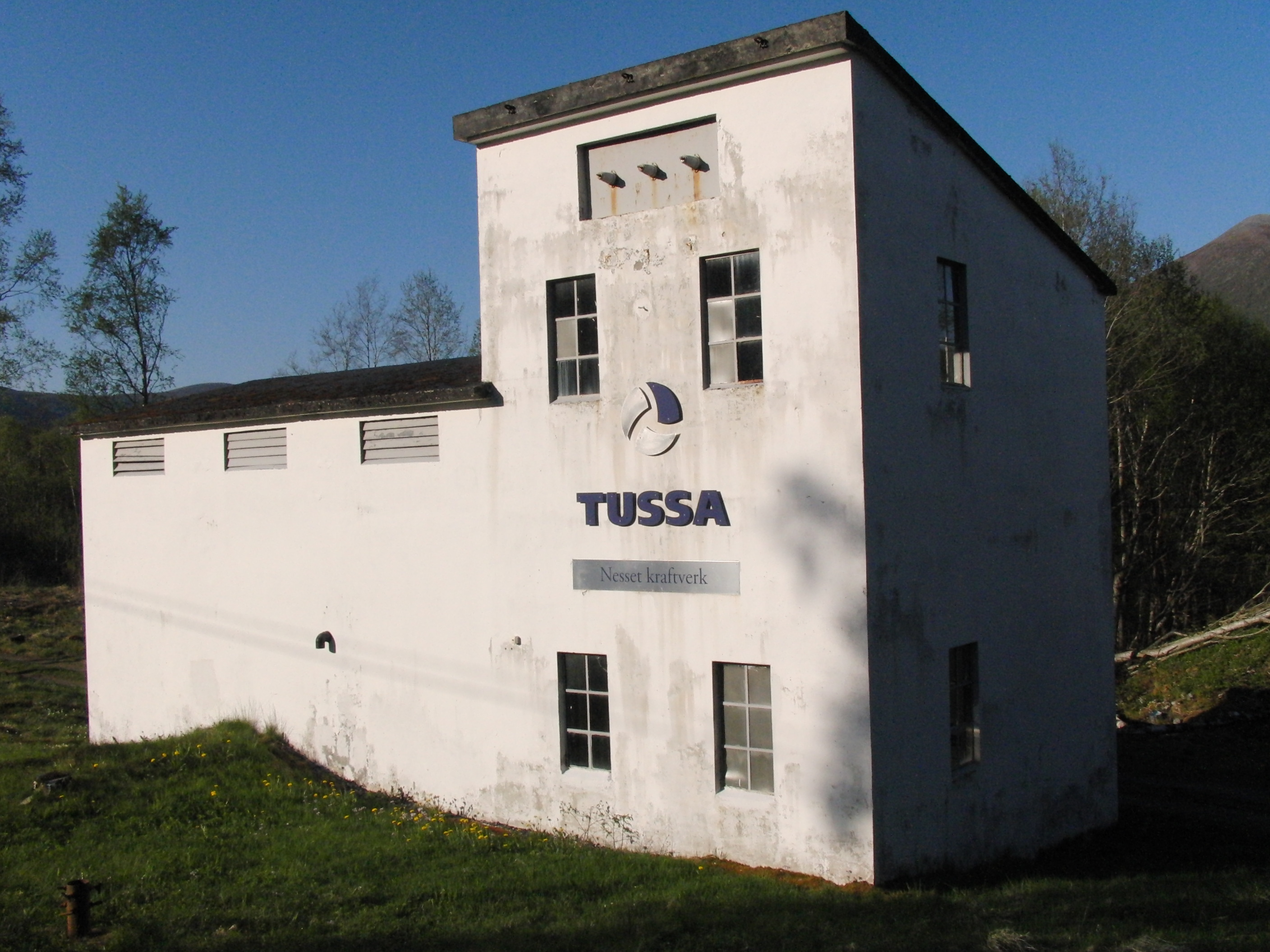 Nesset kraftverk